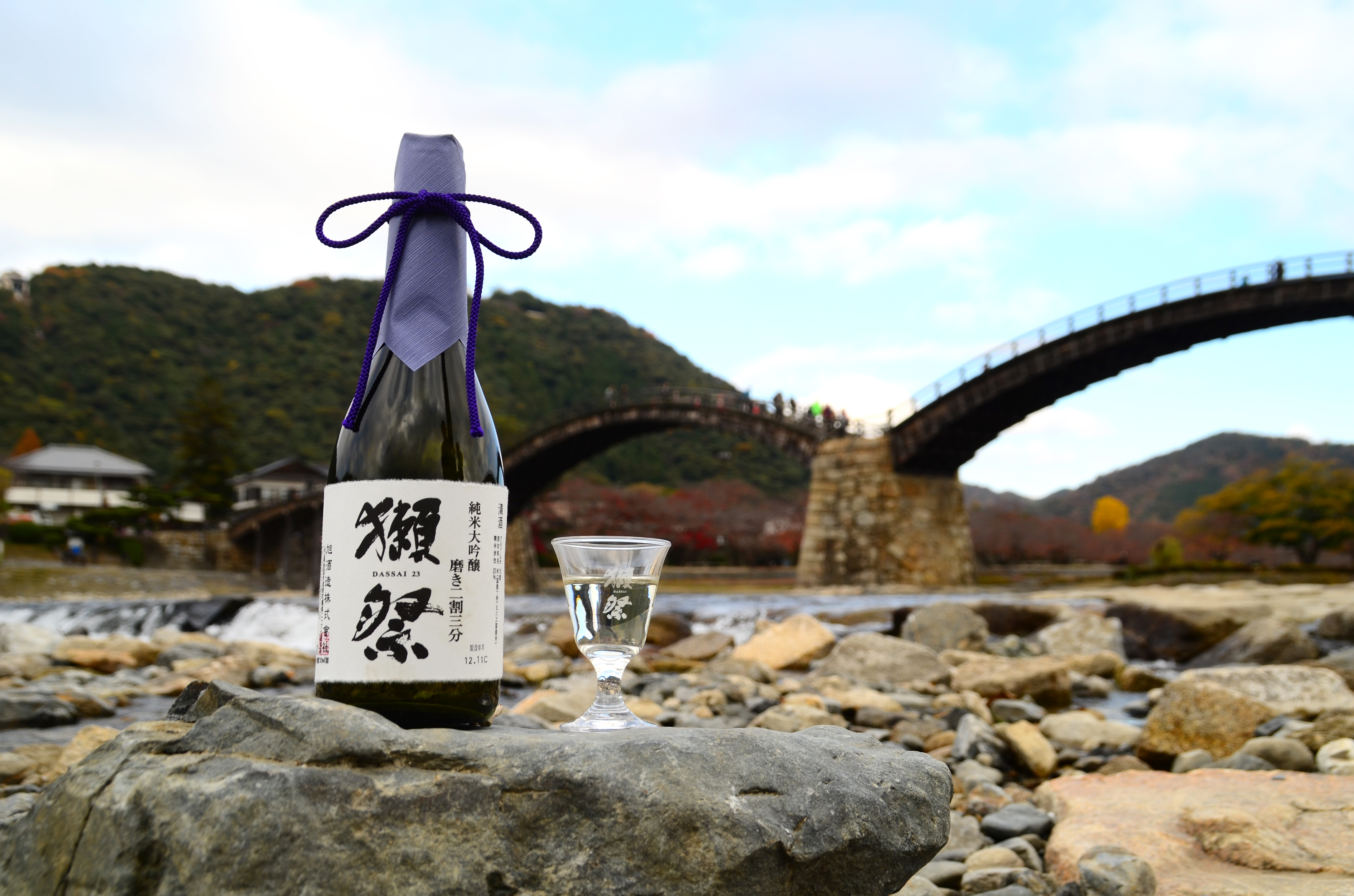 岩国市錦帯橋を背景とする獺祭のフラグシップ、獺祭 純米大吟醸 磨き二割三分。